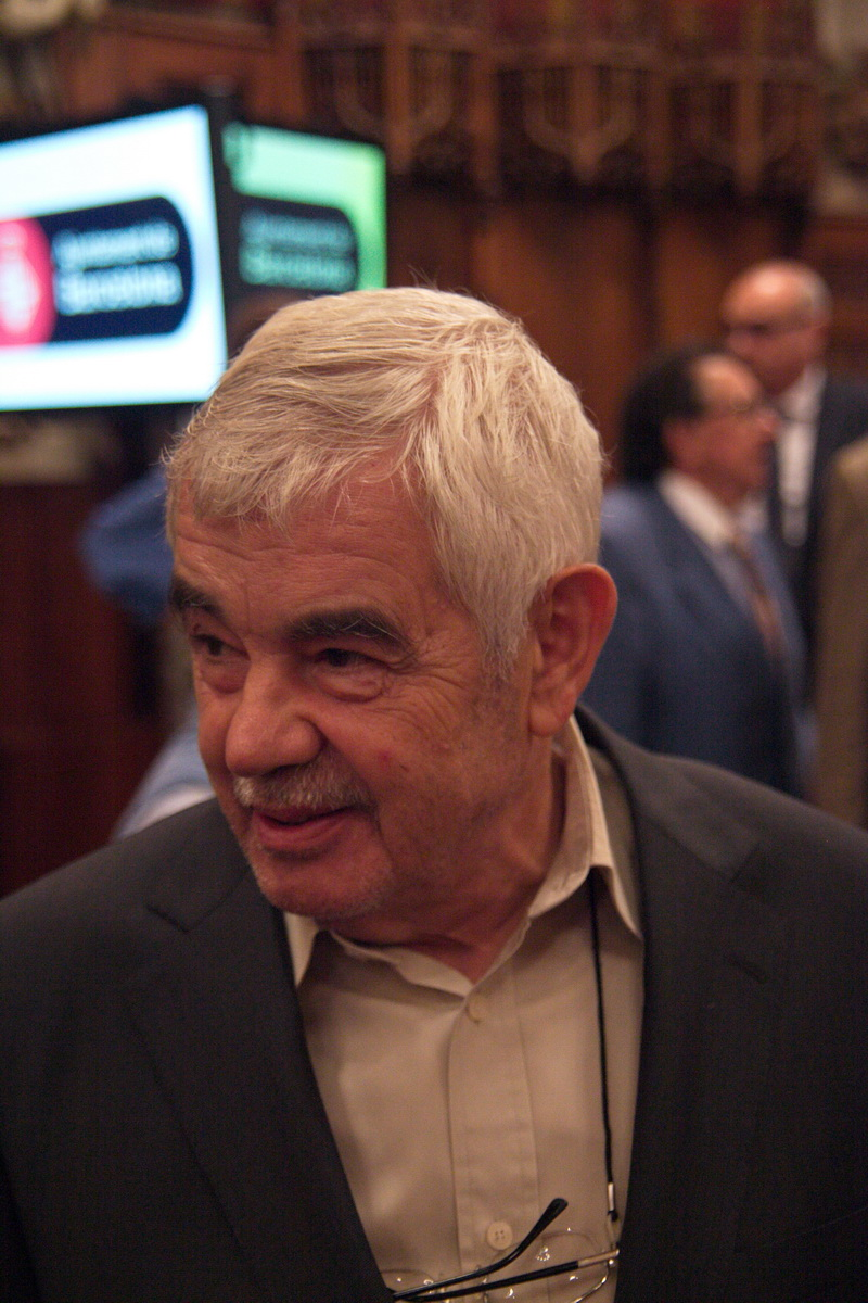 Acte de lliurament de la Medalla d'Or al Mèrit Esportiu de l'Ajuntament de Barcelona a Enric Truñó i Lagares. 6 d'octubre de 2015